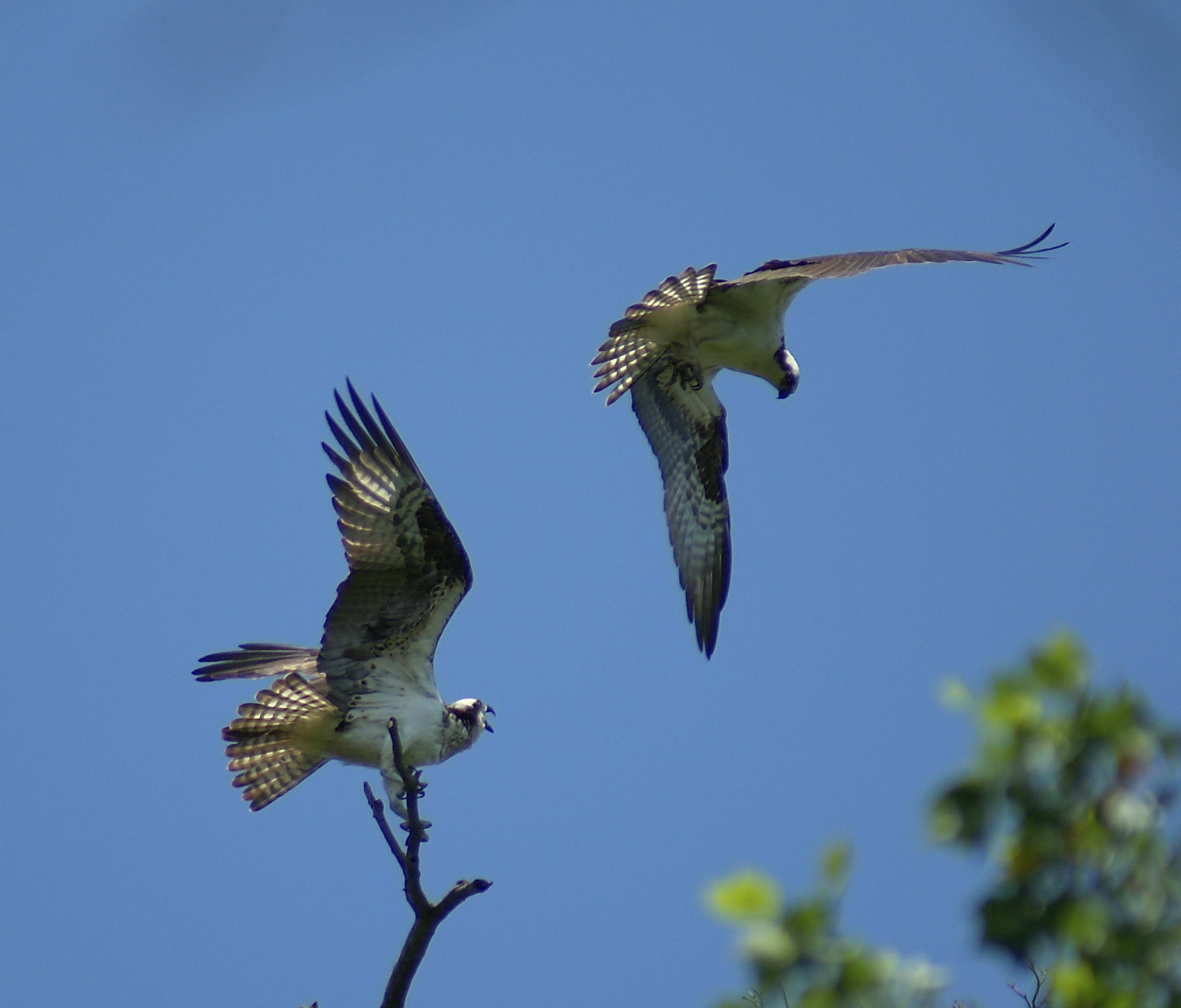 Sierra Exif JPEG